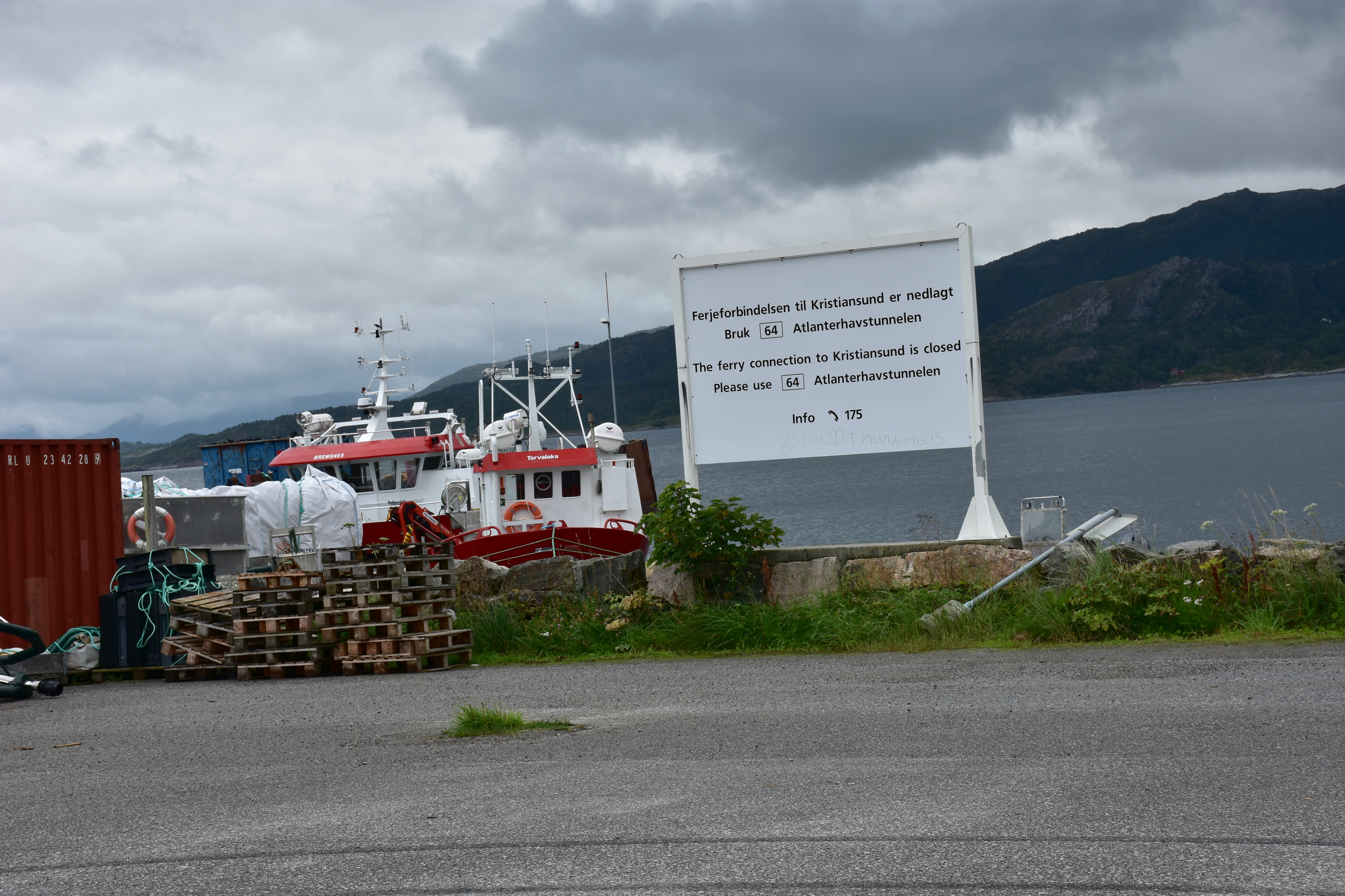 Bremsnes kai